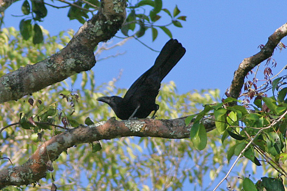 Flores